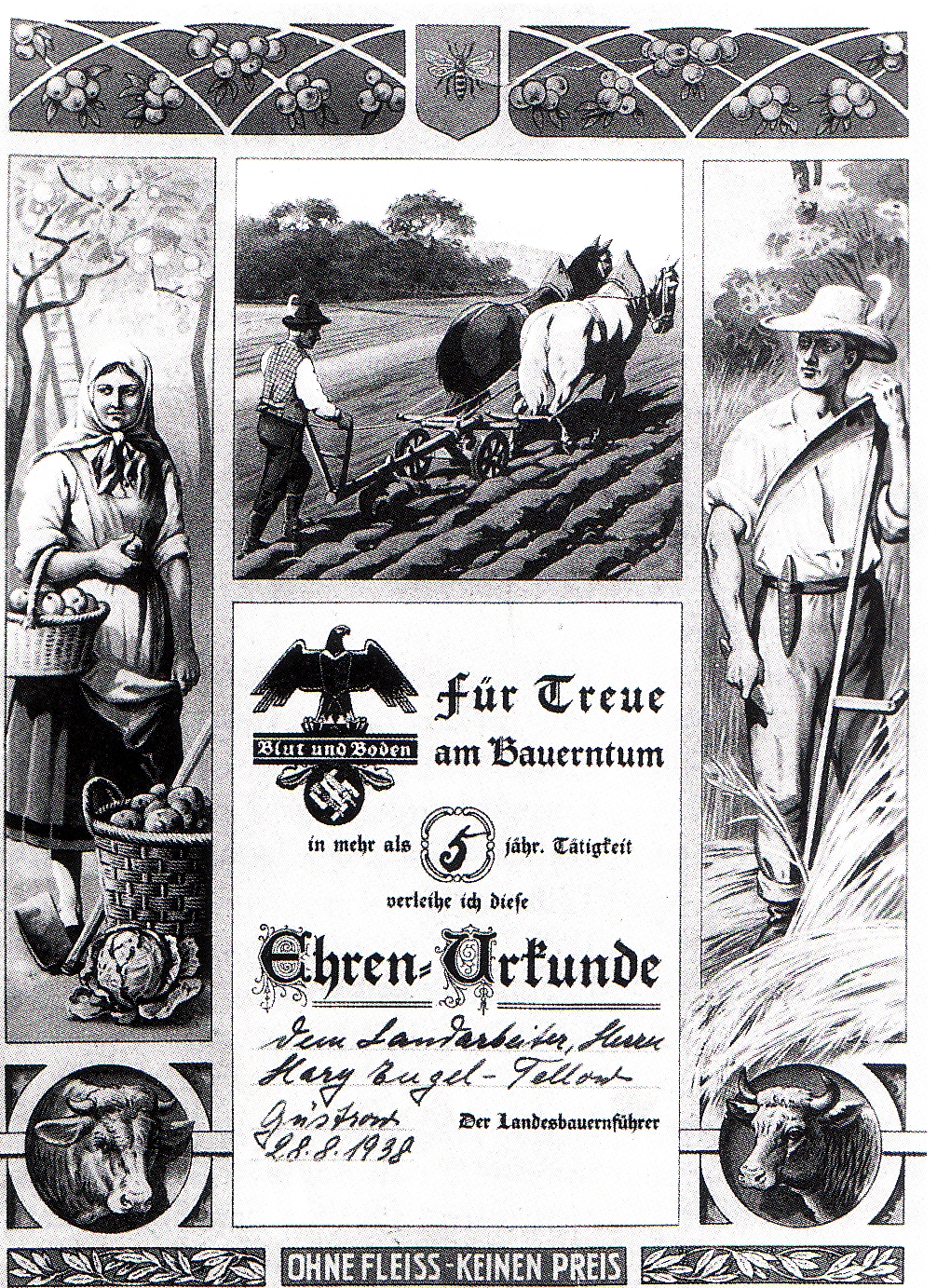 Ehrenurkunde "Für Treue am Bauerntum" für einen Landarbeiter in Tellow: Für Treue am Bauerntum in mehr als 5 jähr. Tätigkeit verleihe ich diese Ehren-Urkunde (dem Landarbeiter, Herrn Hary Eugel - Tellow) (Gustrow 28.8.1938) Der Landesbauernführer